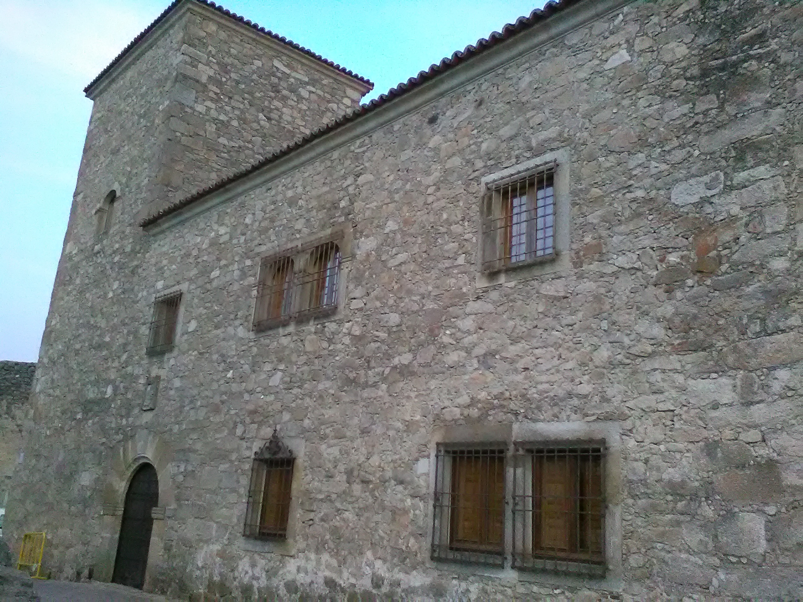 Palacio de Lorenzana, sede de la Real Academia de Extremadura, en Trujillo (Cáceres, España)